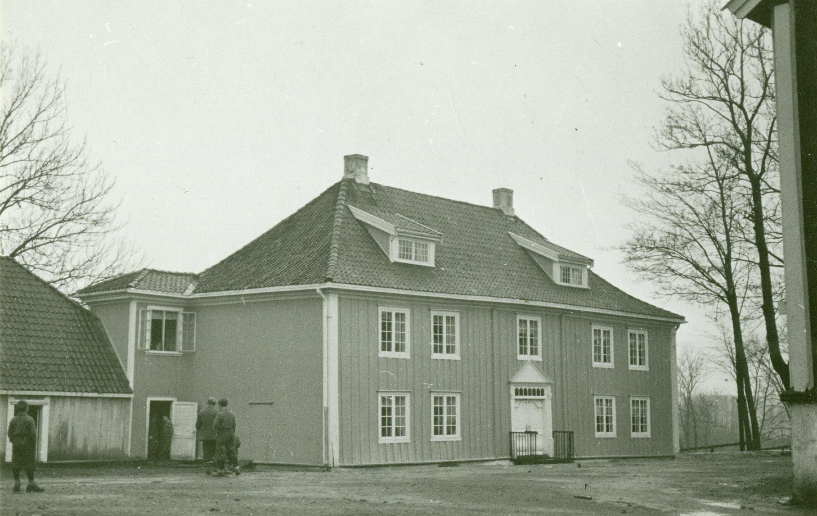 Vøyen Østre, Wøien, Akershus This image on crowdsourcing geotagging platform Fotodugnad